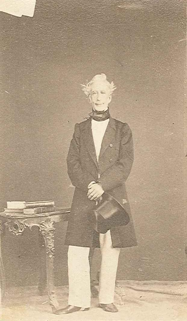 Francisco de Paula Martínez de la Rosa Berdejo Gómez y Arroyo. Fotografía